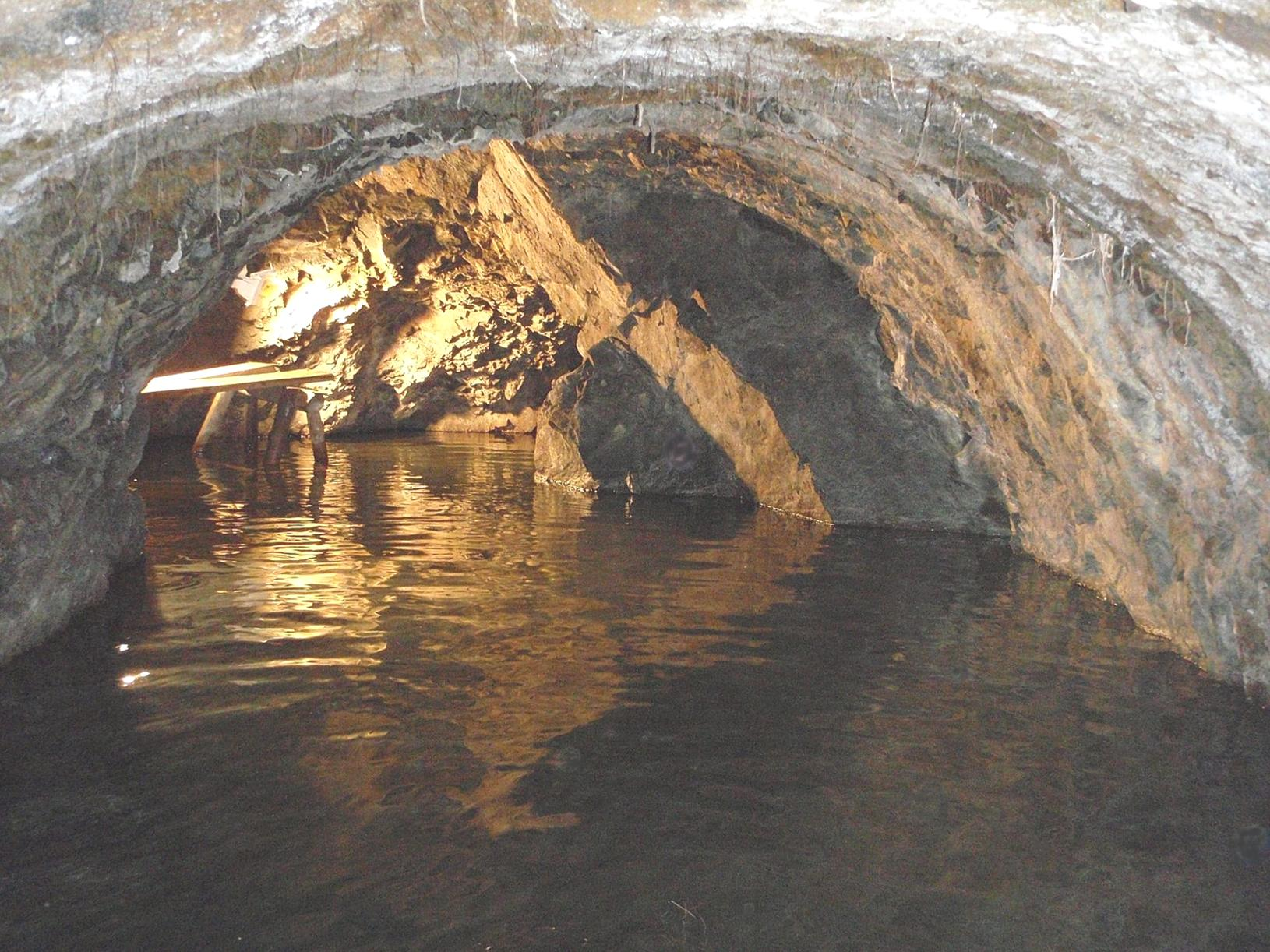 Unterirdischer Keller unter dem Gasthaus Haidl in Thaya